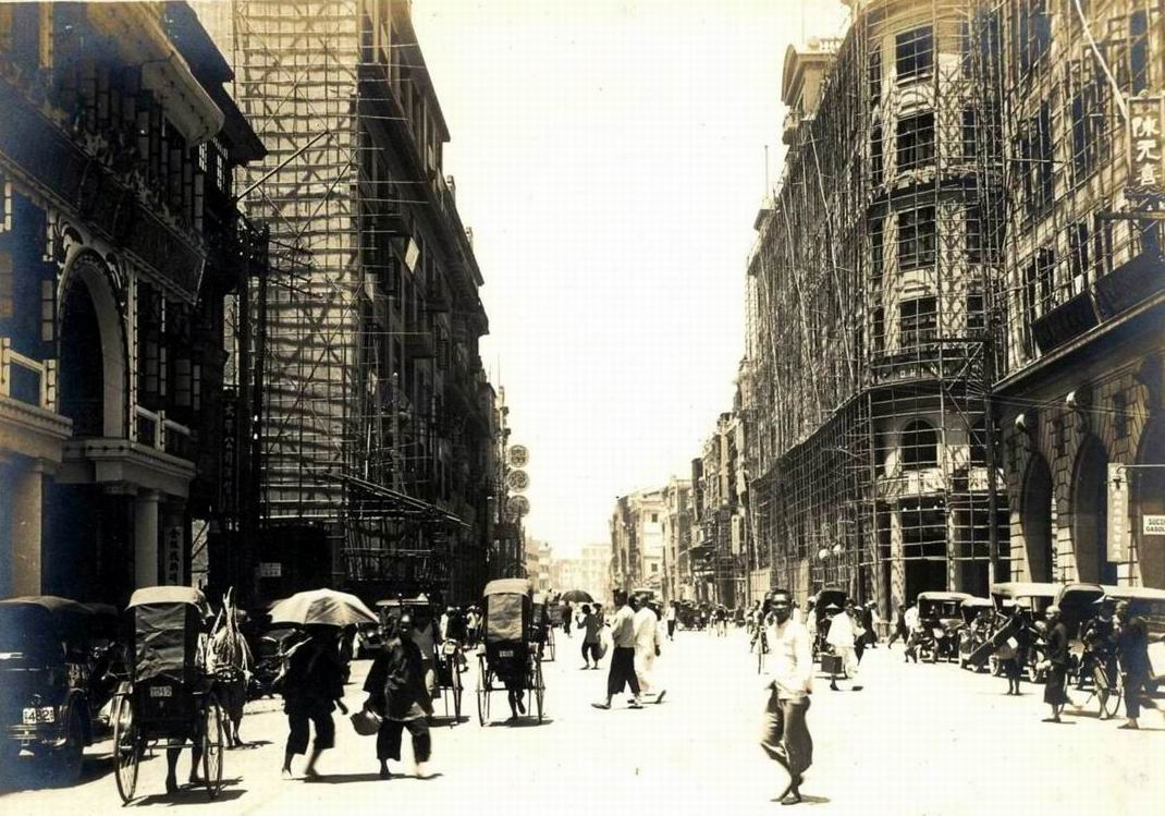 廣州市太平南路（現人民南路）。